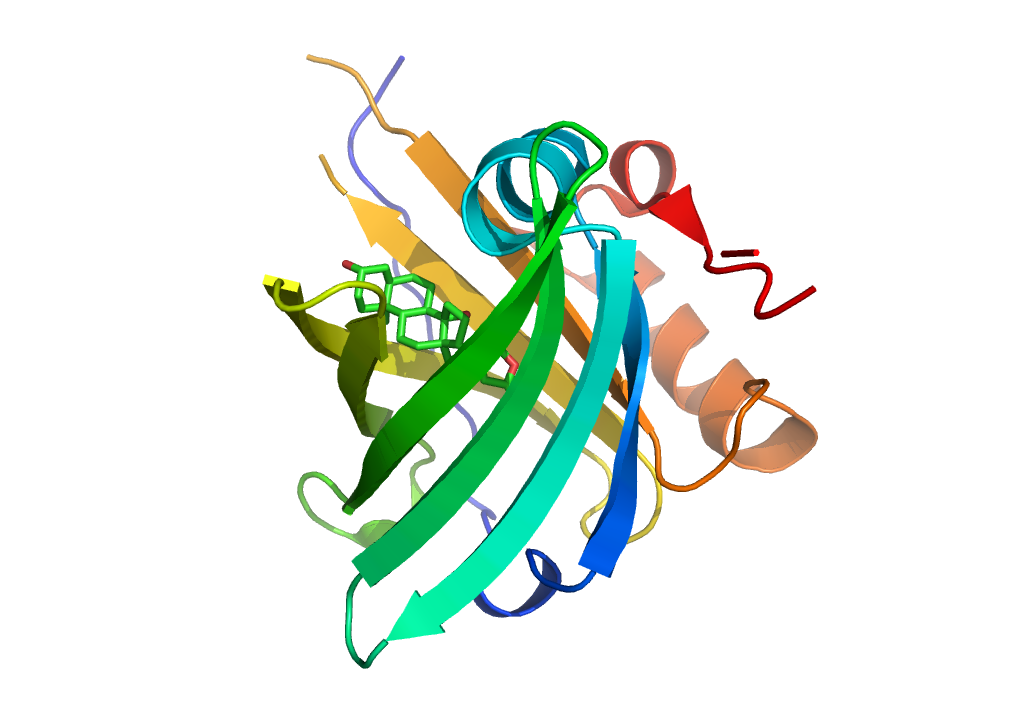 Bändermodell des Anticalins DIGA16 in Komplex mit Digitoxigenin basierend auf Kristallstrukturdaten (PDB 1LNM). Struktur gerendert mit PyMol 0.99. Siehe auch: Korndoerfer IP, Schlehuber S, Skerra A (2003). Structural mechanism of specific ligand recognition by a lipocalin tailored for the complexation of digoxigenin. J. Mol. Biol. 330: 385-396.